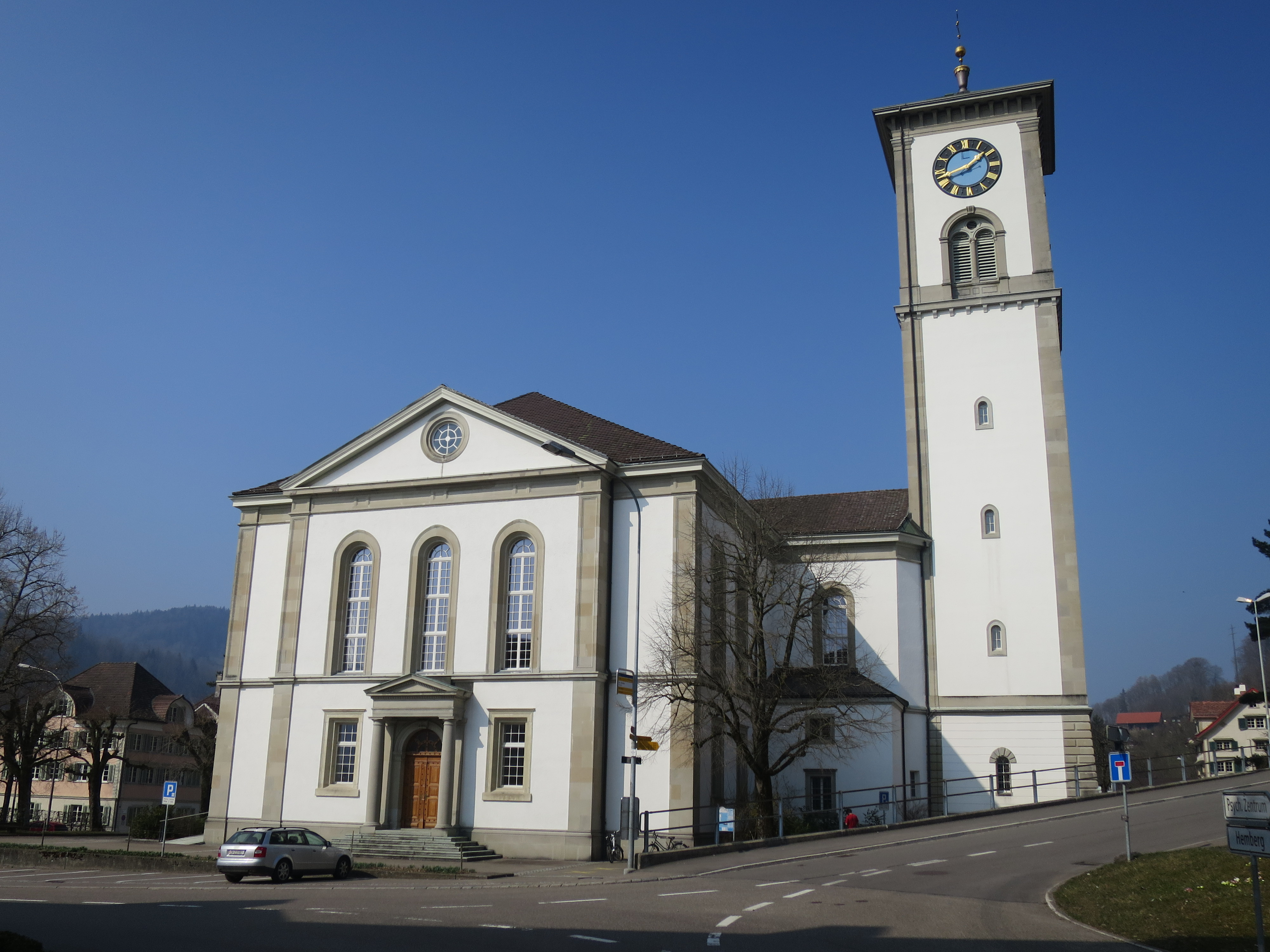 Aussenansicht der ref. Kirche Wattwil